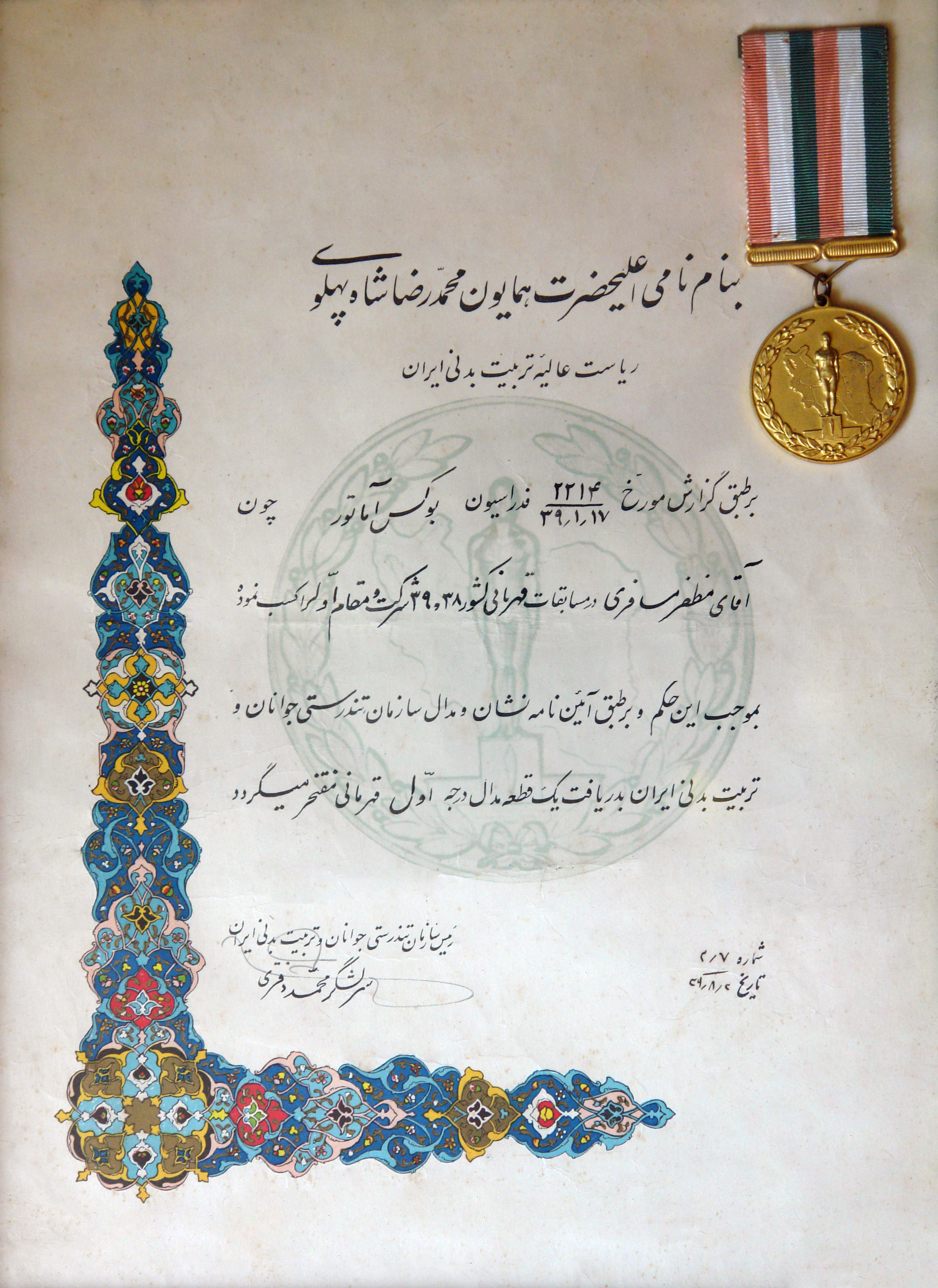 حکم و مدال قهرمانی مسابقات کشوری سال ۳۸